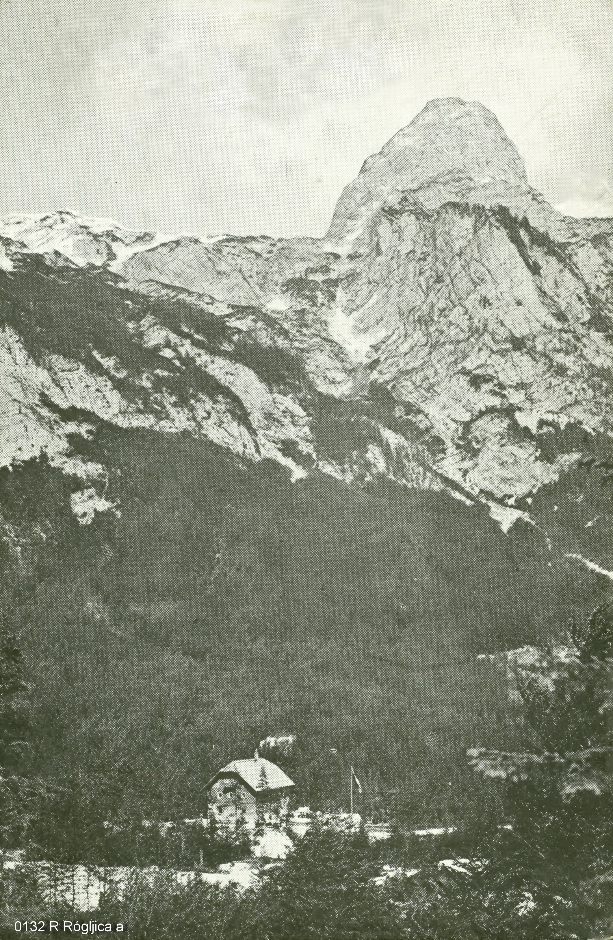 Stara raszglednica kupljena 1935.